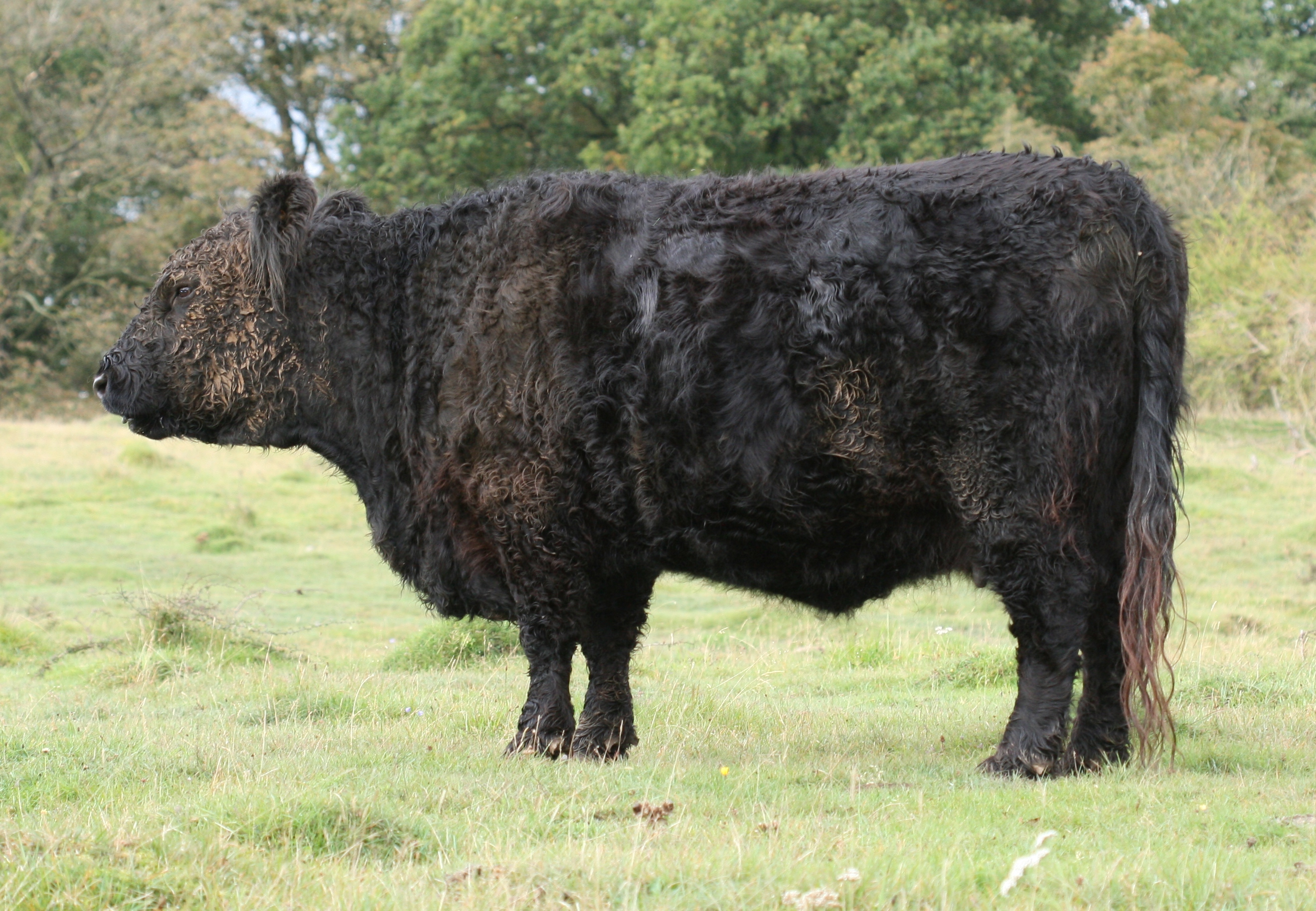 Kendal, England